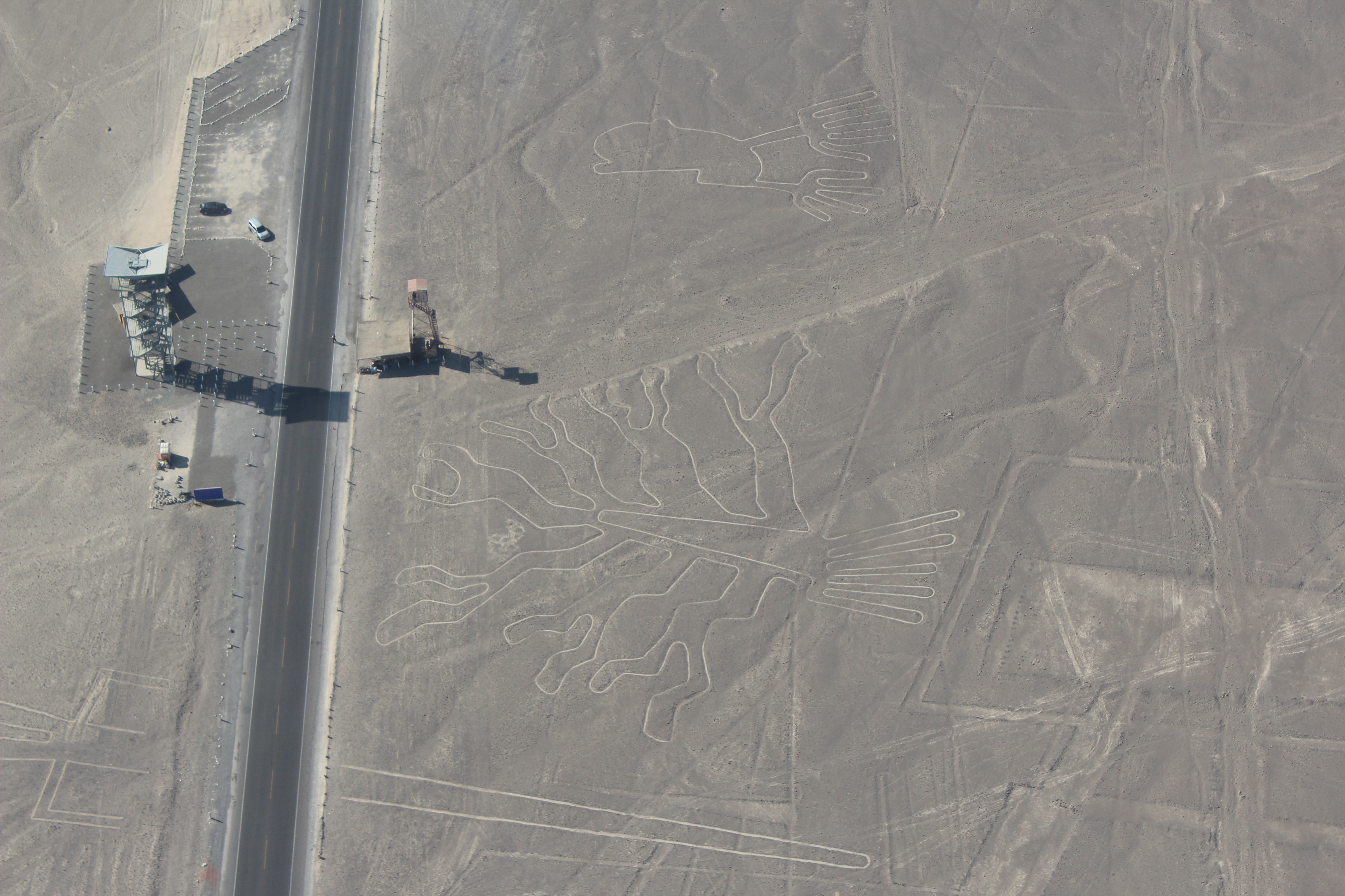 Antonio Campoy Ederra - 48759370606